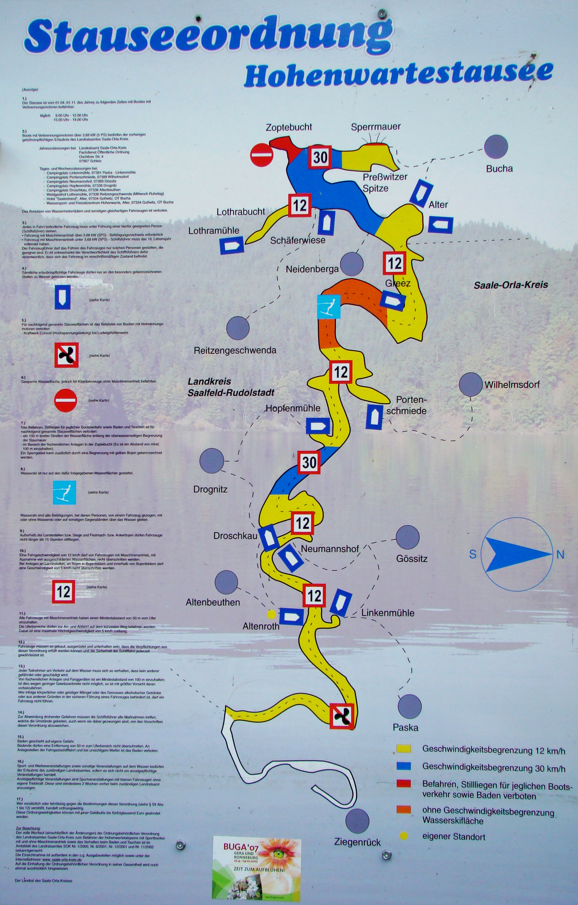 Plan des Hohenwartestausee